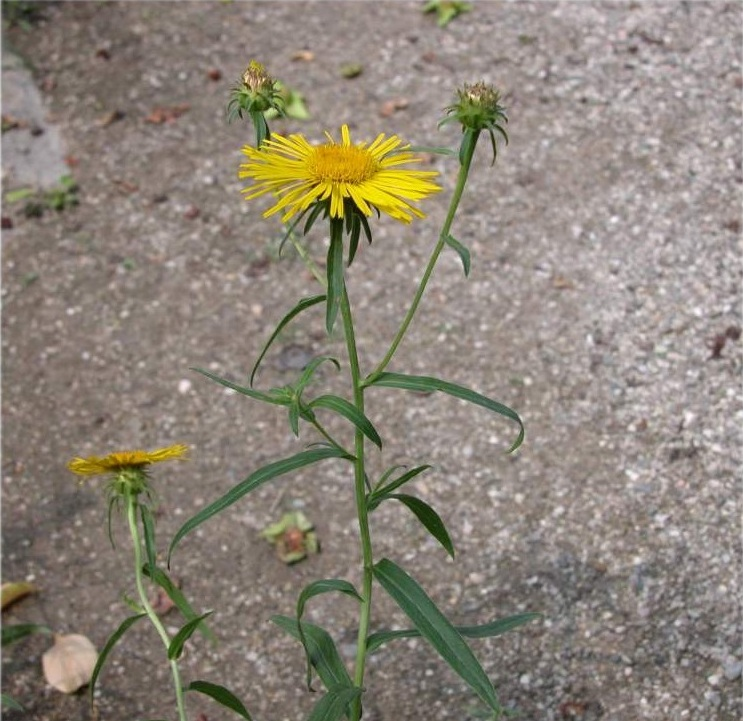 Inula salicina subsp. salicina - Dipartimento di Scienze della Vita, Università di Trieste - Progetto Dryades - Comune di Padova, Orto Botanico., PD, Veneto, Italia.